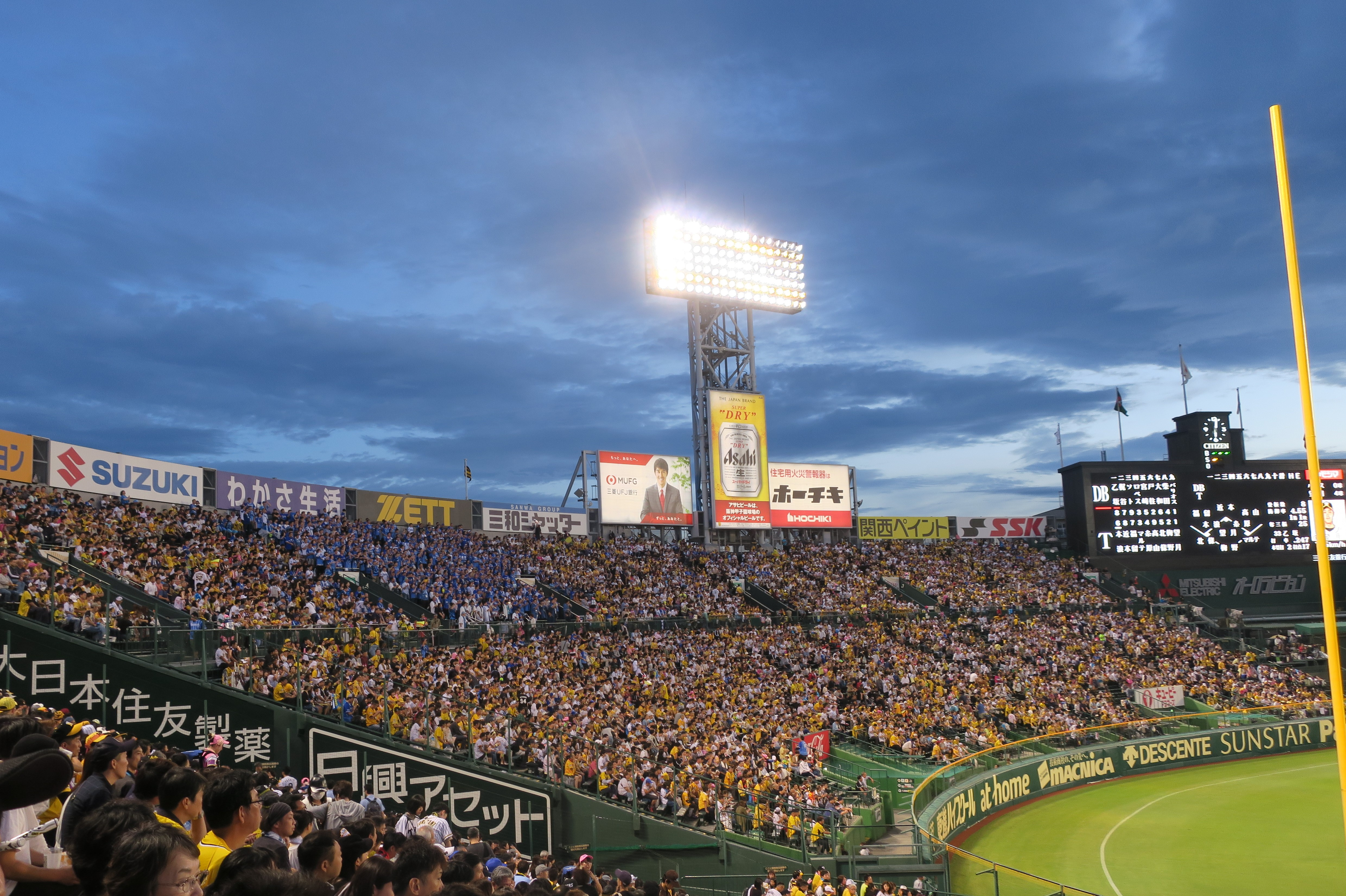 阪神甲子園球場レフト外野スタンド（2019年9月22日、阪神タイガースvs横浜DeNAベイスターズ）。